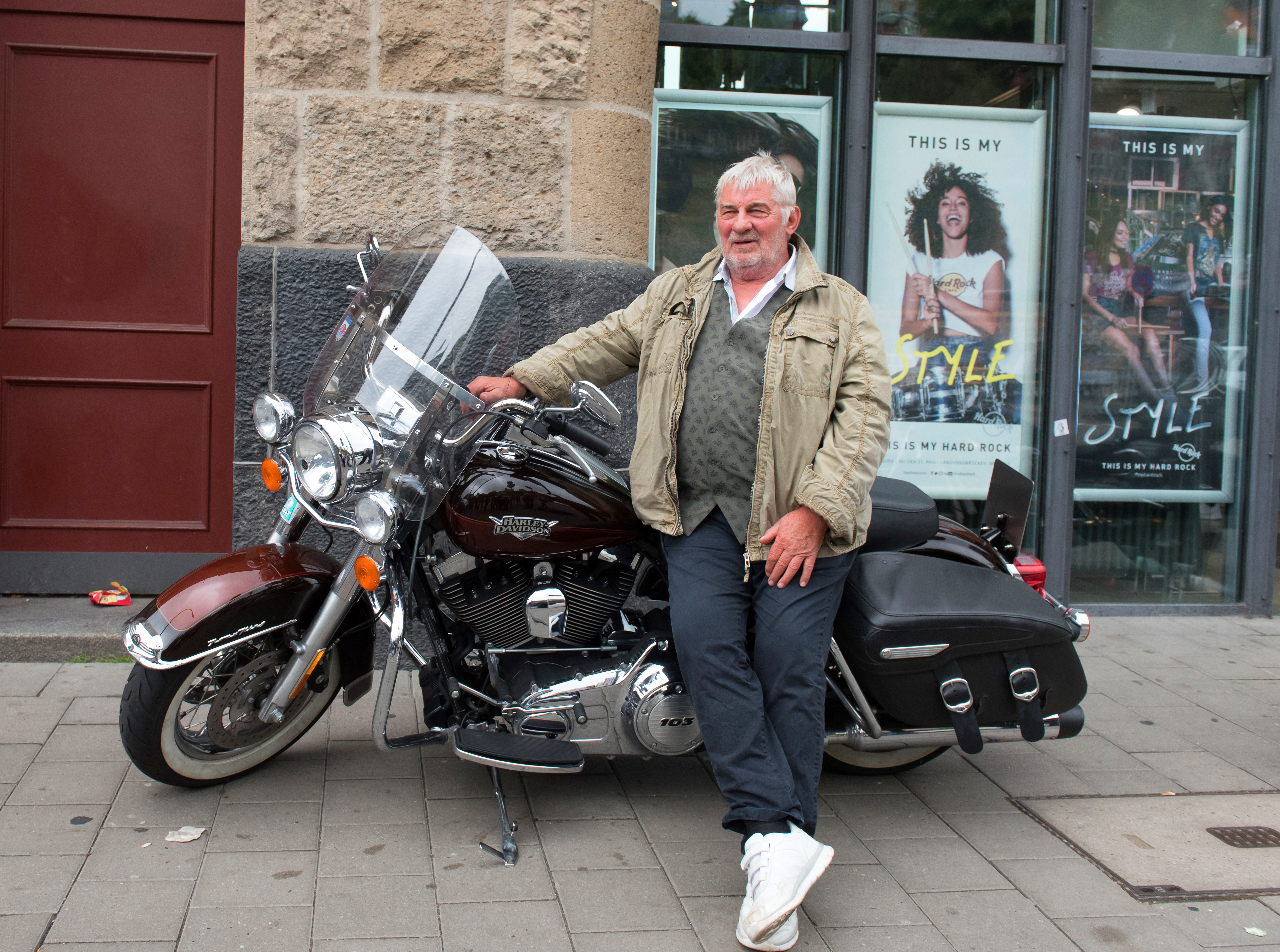 Heinz Hoenig bei der PresseKonferenz zu den Hamburg Harley Days 2018